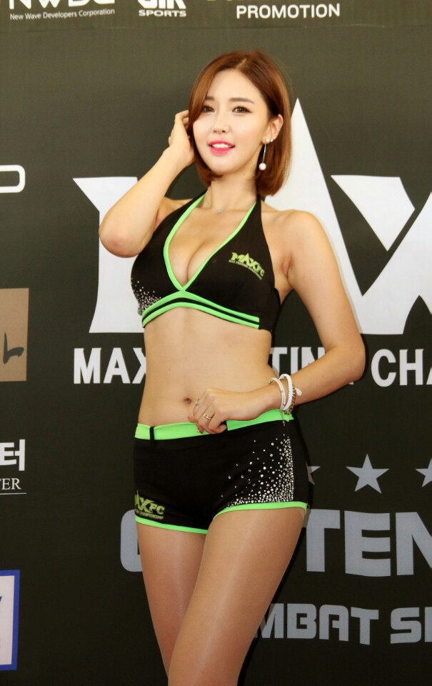 maxfc 라운드걸 최별하